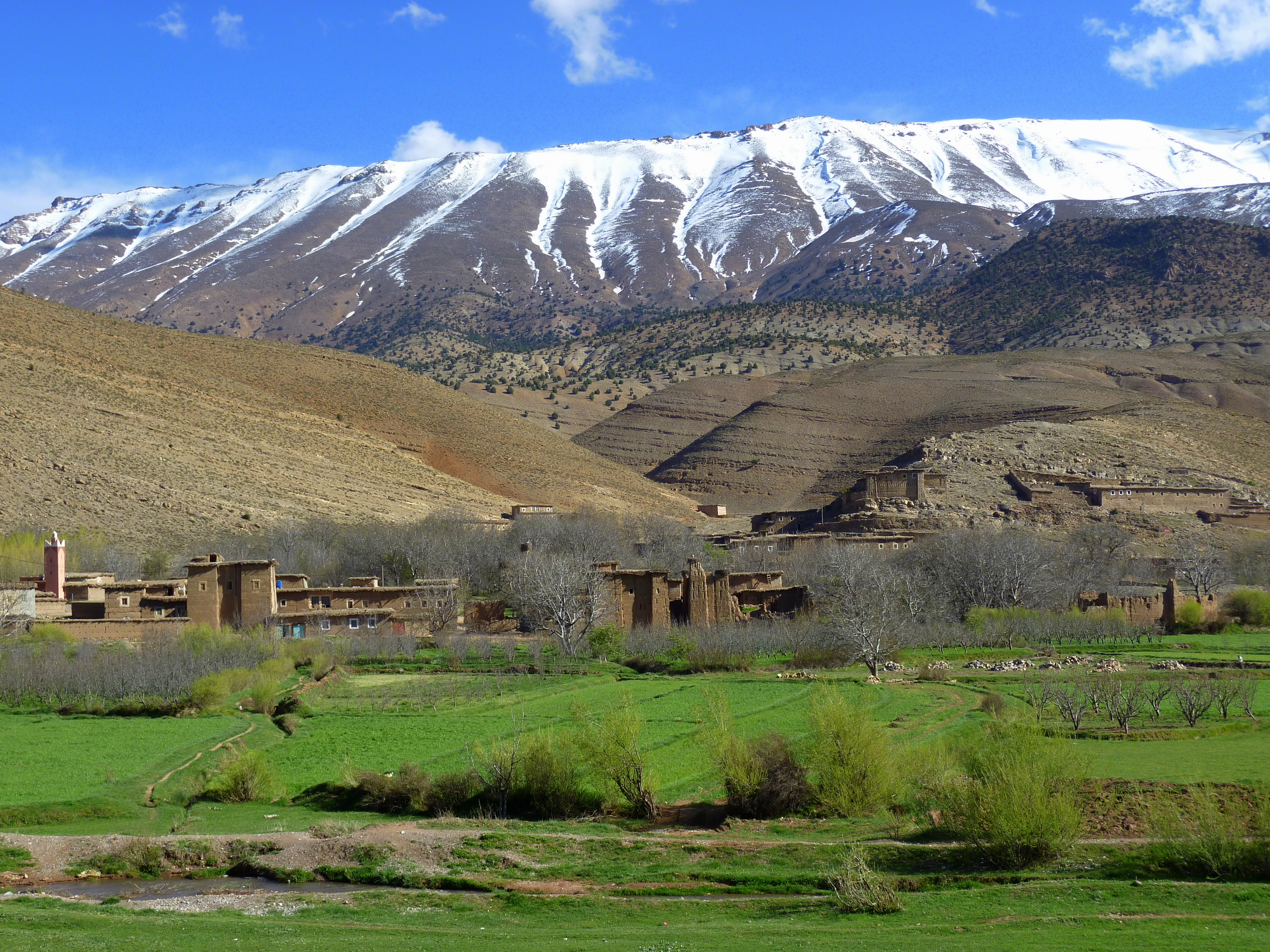 Tabant, Ait Bougmez